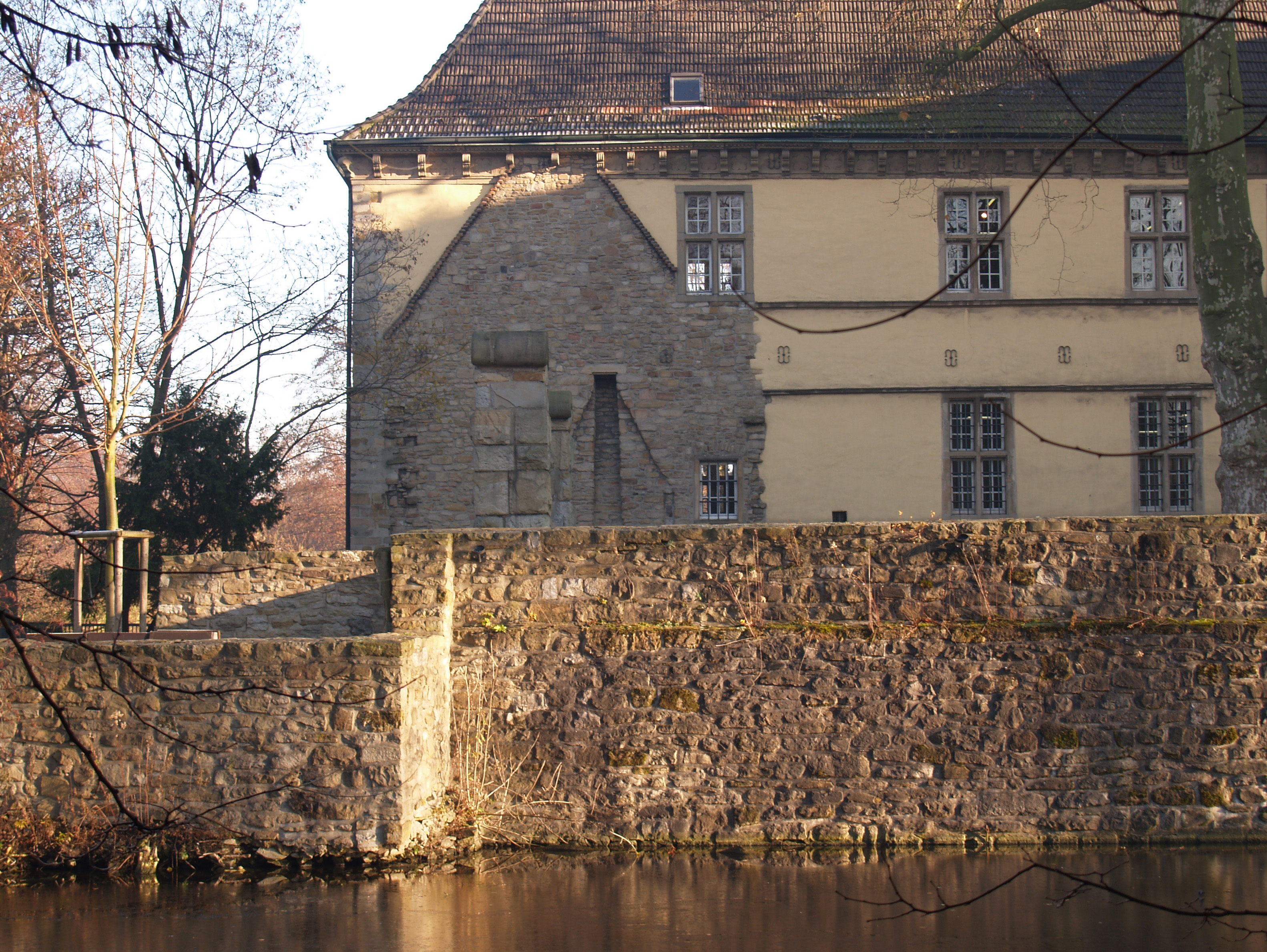 Schloss Strünkede, Schlosshof und Wand des ehemaligen Nordflügels